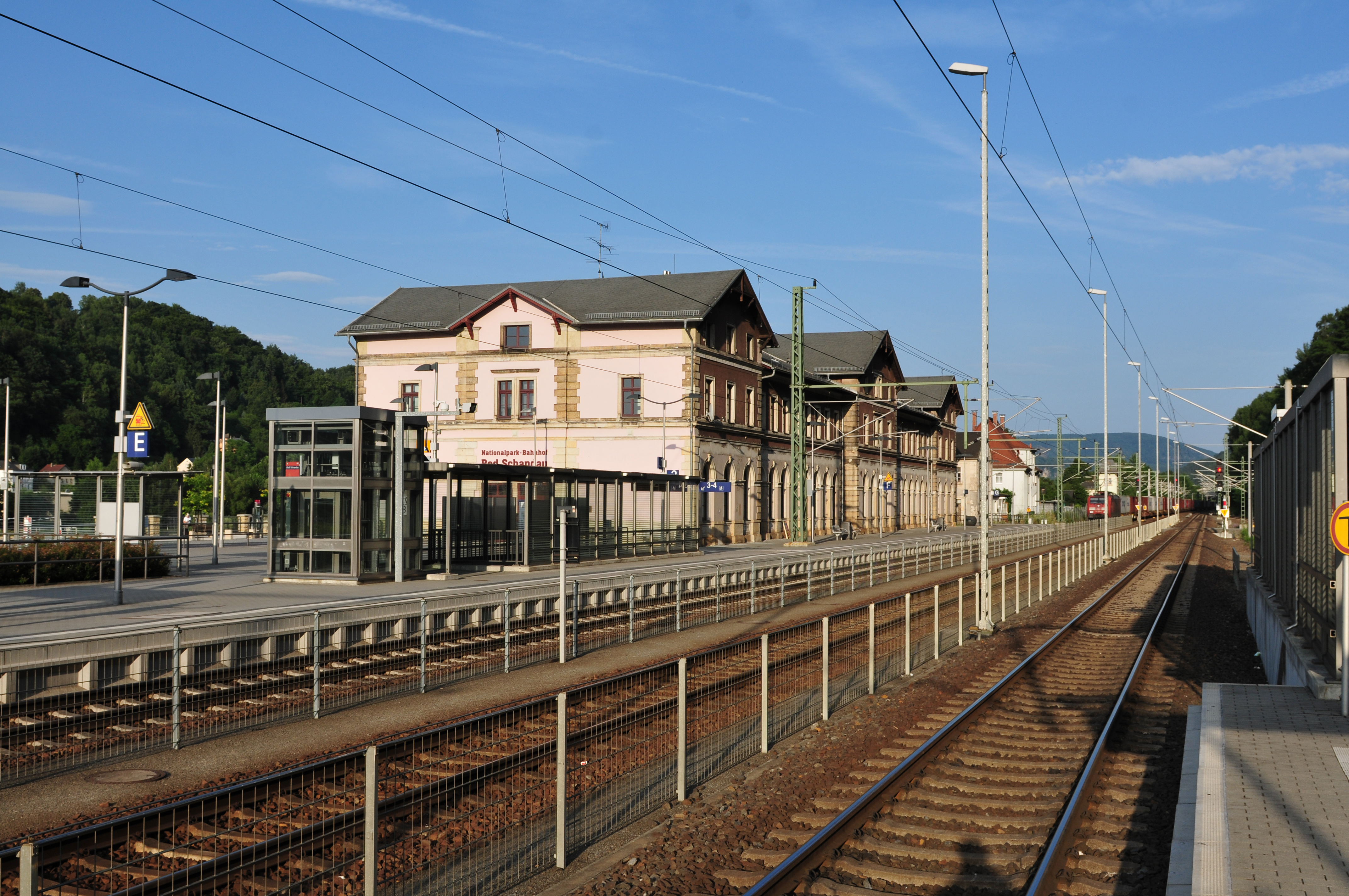 Bahnhof Bad Schandau